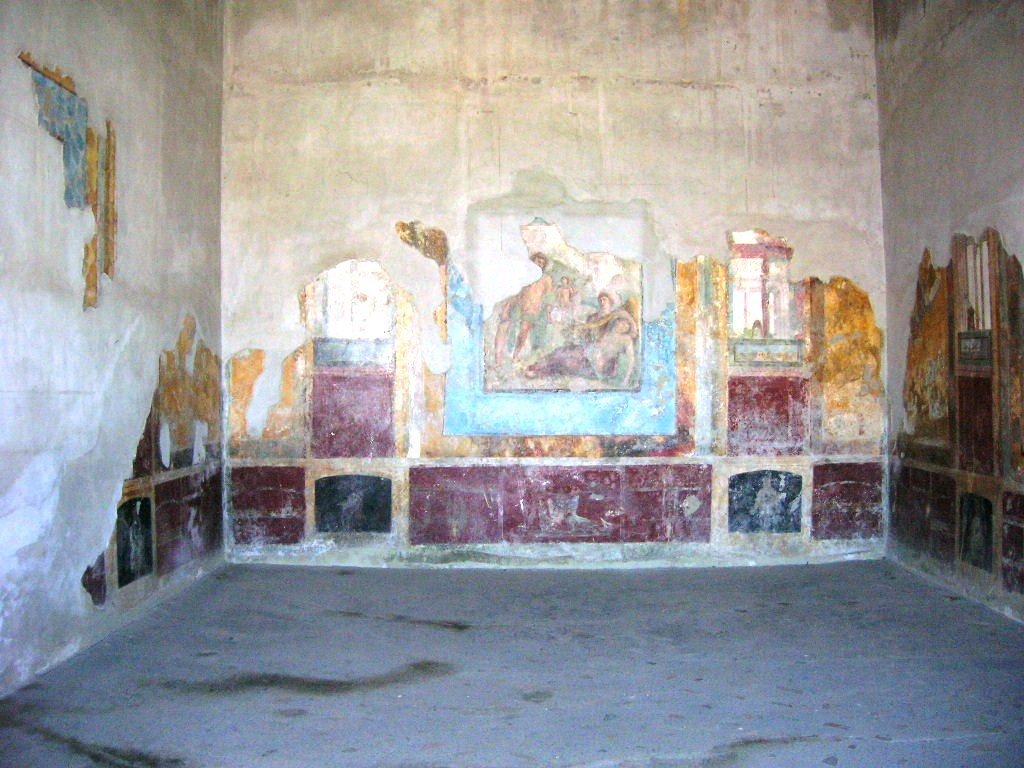 La stanza con la raffigurazione del mito di Arianna